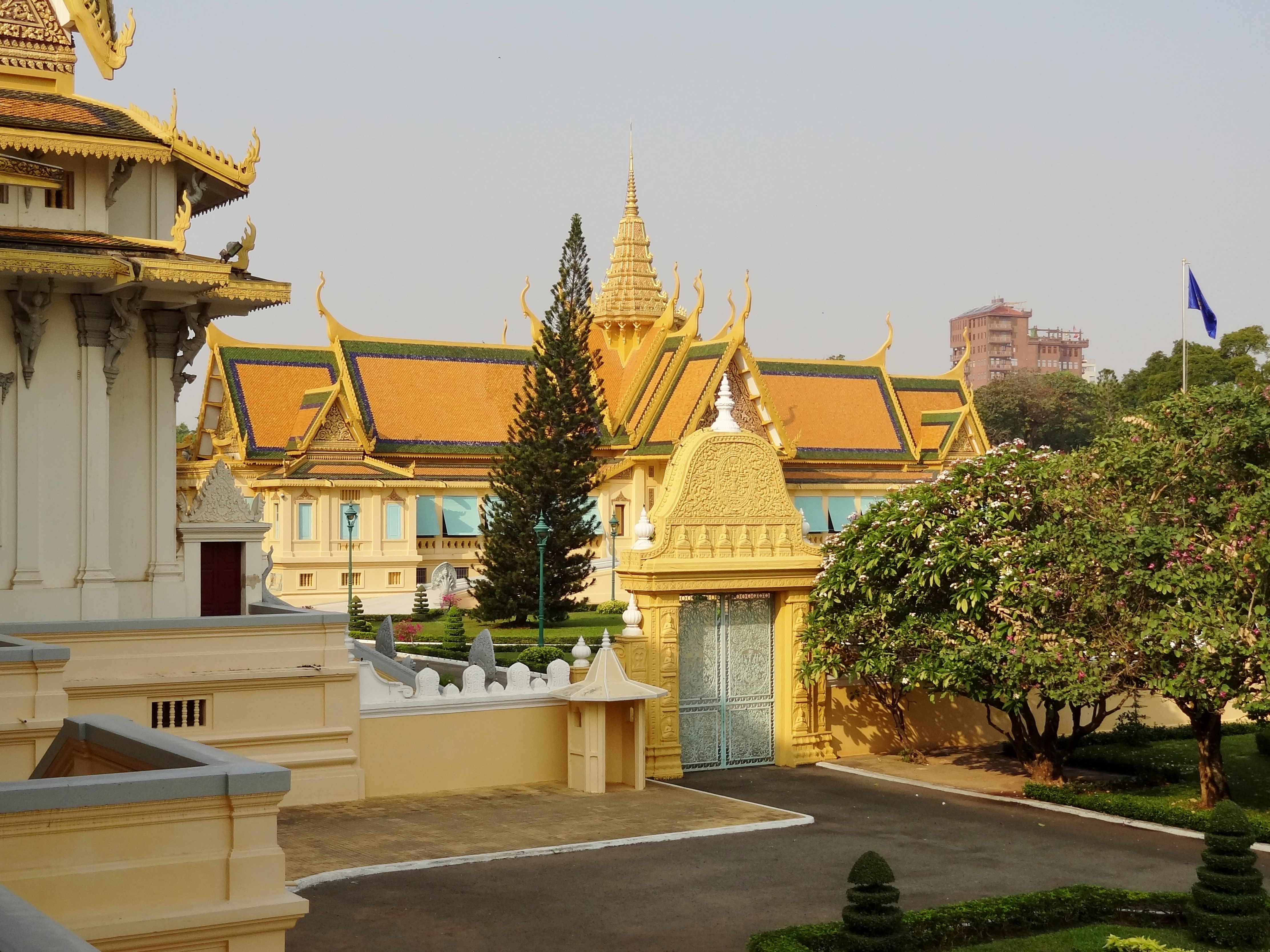 Preah Moha Prasat Khemarin im Königspalast von Phnom Penh, Kambodscha